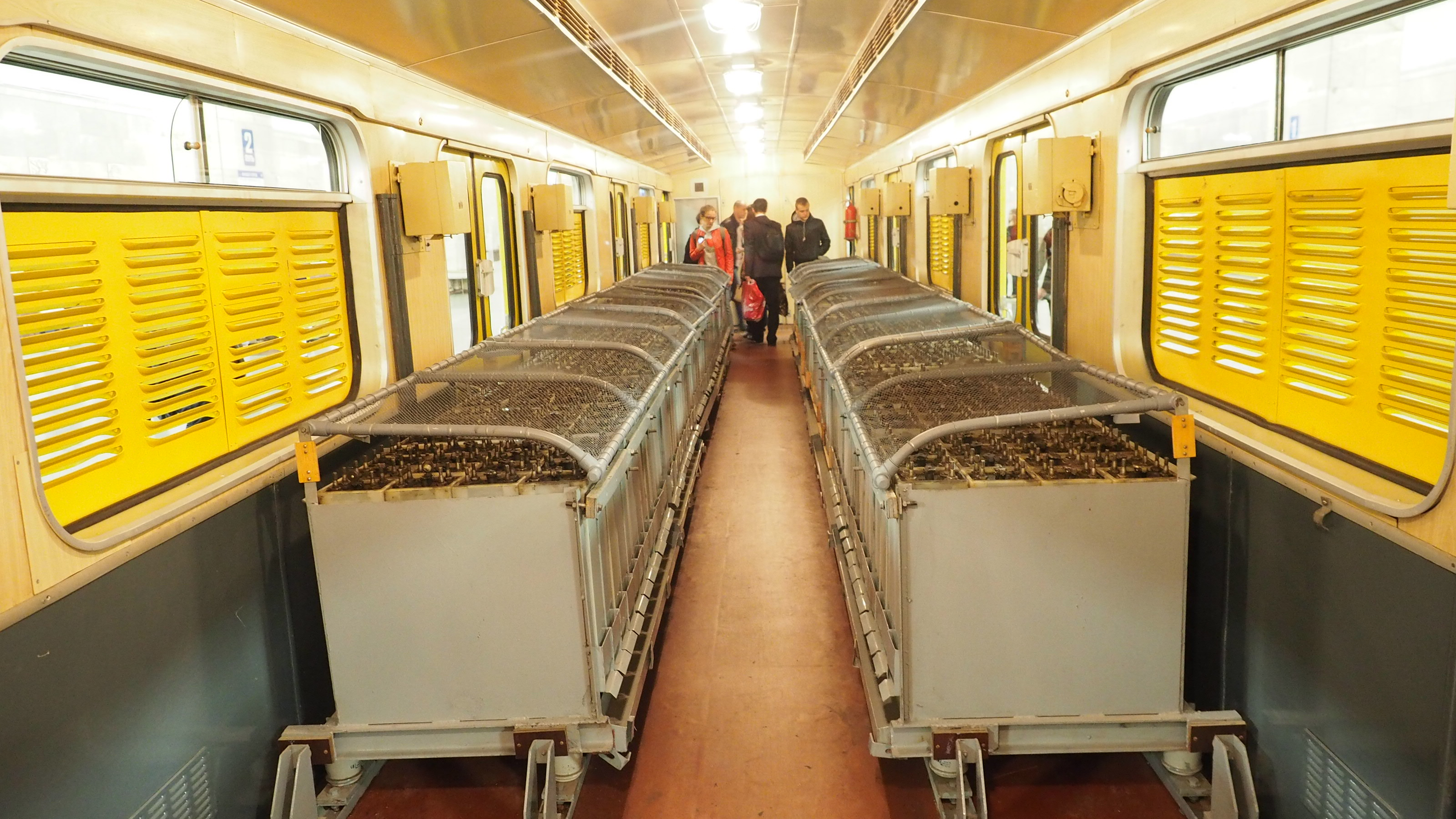 Аккумуляторный электровоз ВЭКА-001. Выставка подвижного состава и парад поездов к 80-летию Московского метрополитена 15 мая 2015 года. 15 and 16 may of 2015 Moscow Metro celebrating 80 years of operation. There is a for frist time exibition of recently restored historic cars at siding track of Partizanskaya station. 15 и 16 мая 2015 в Москве отмечалось 80 лет Московскому метро. Впервые была устроена выставка исторических вагонов. Они были расставлены на 3 пути станции Партизанская.